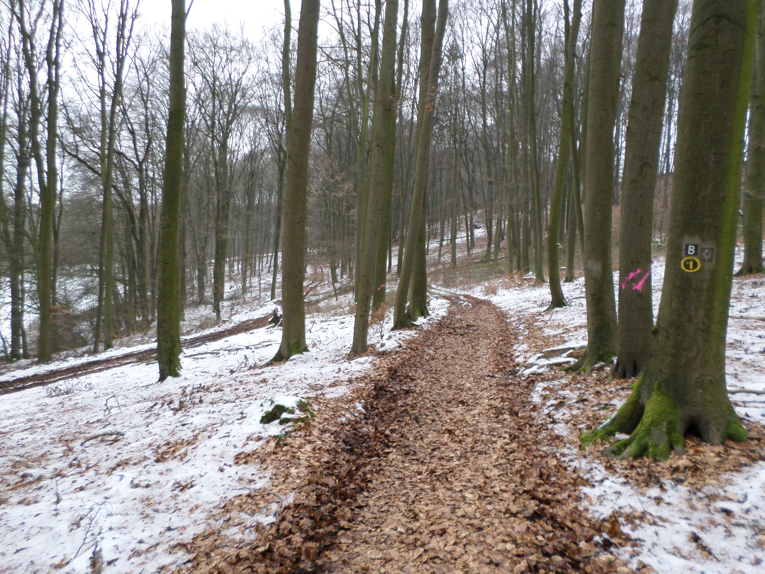 Baunapfad zwischen Rengershausen und Guntershausen